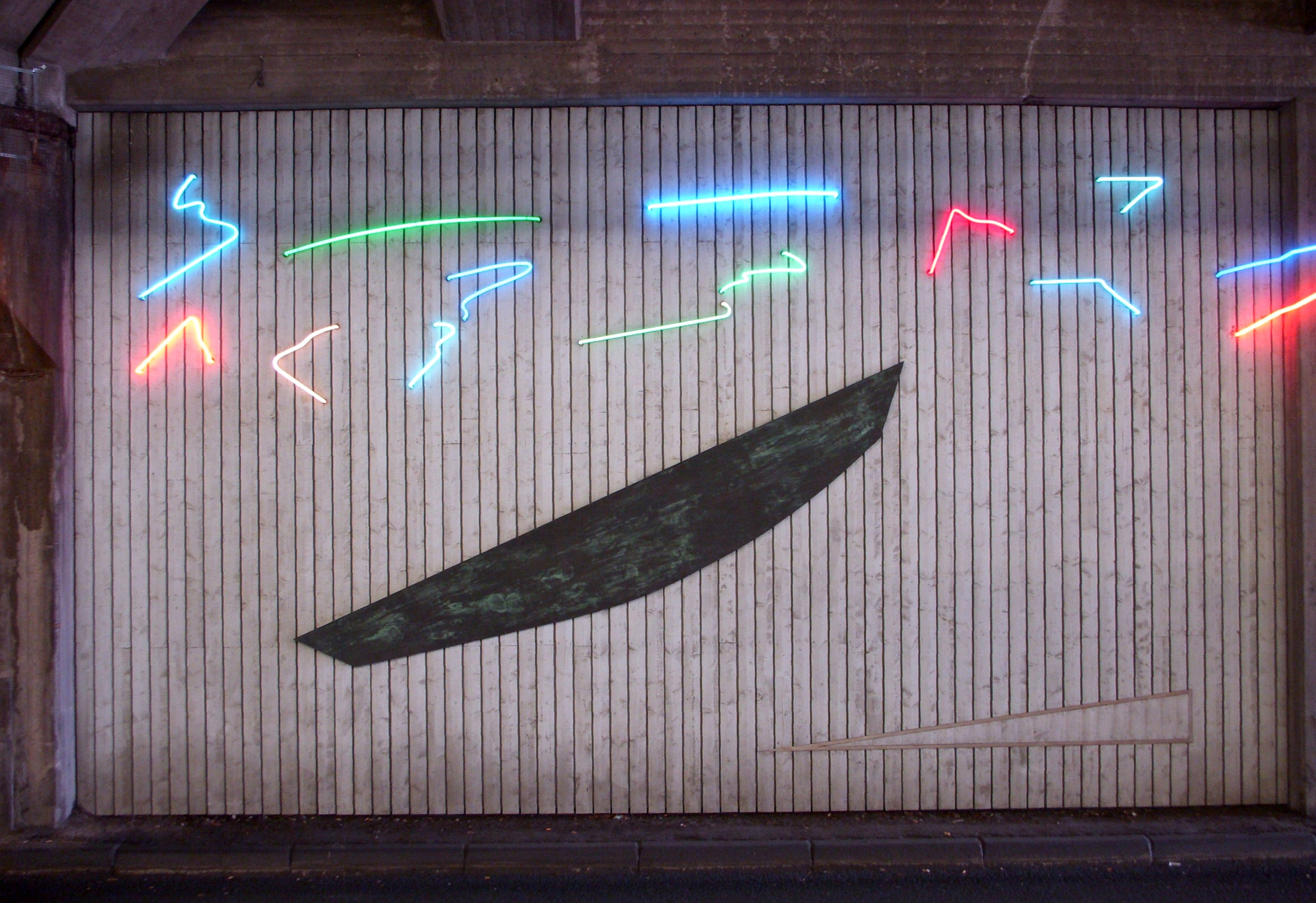 Slussen, Stockholm, inventering april 2009, neonkonst av Gun Gordillo